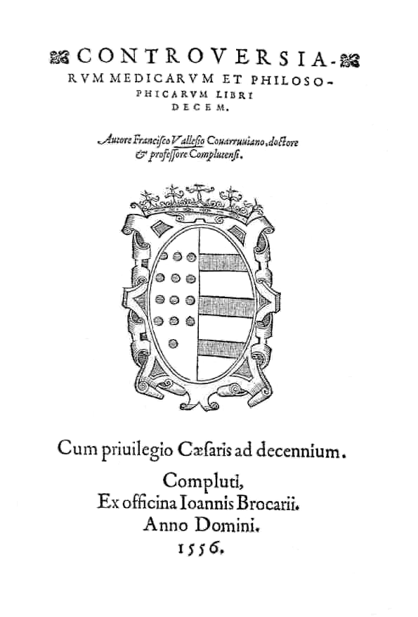 Primer libro publicado por el Dr. Francisco Vallés, titulado: Controversiarum et philosophicarum libri decem. En Alcalá de Henares, en el año 1556, en la imprenta de Juan de Brocar.